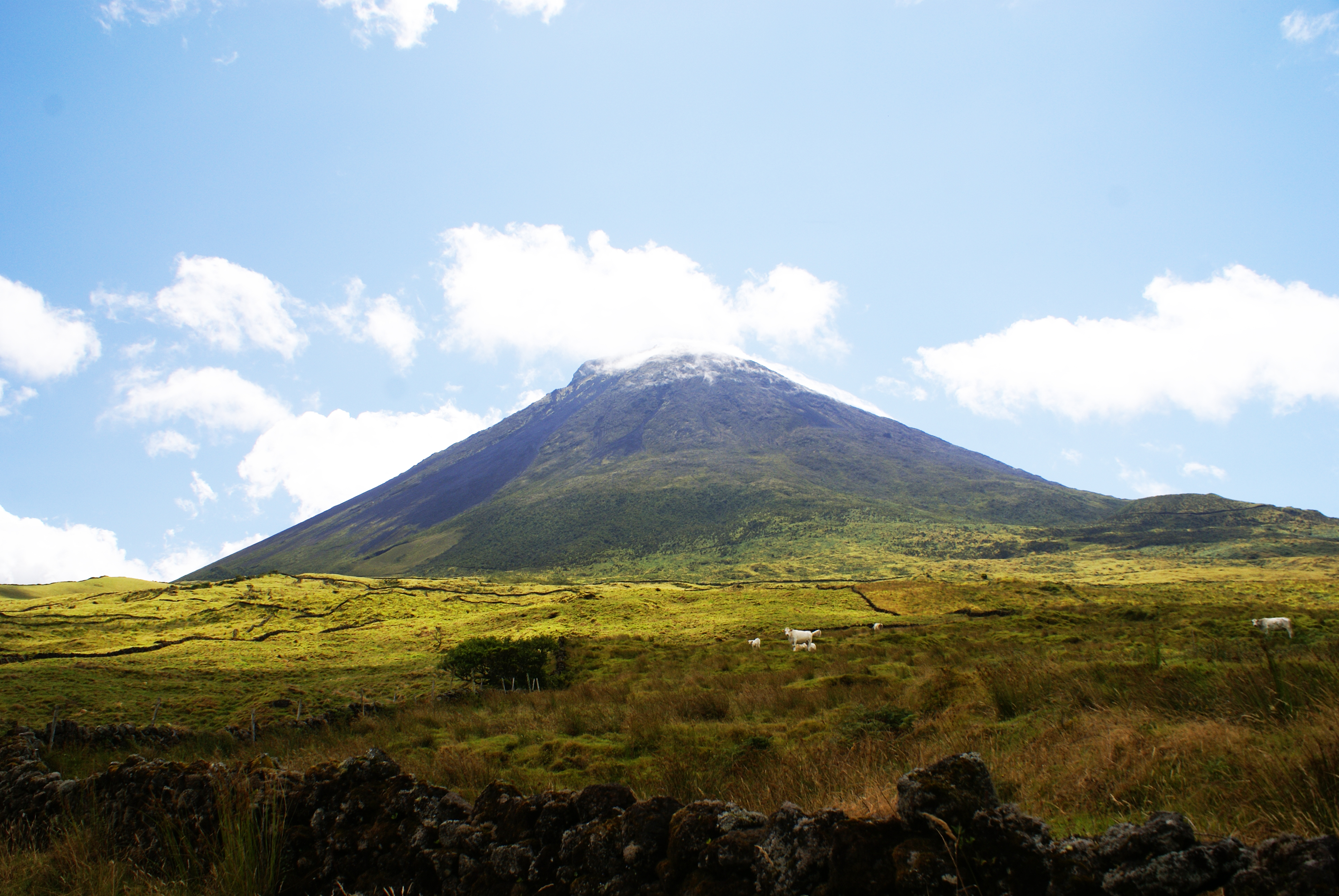 Montanha do Pico, os seus aspectos, ilha do Pico, Açores, Portugal